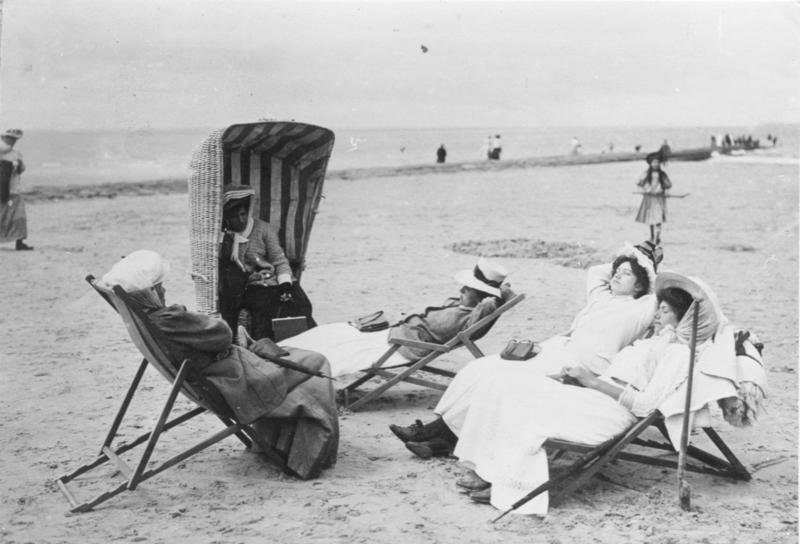 So badete man damals! Wasser ist nass. Völlig angezogen läßt man es sich daher in Liegestühlen und Strandkörben gut sein. Norderney 1910